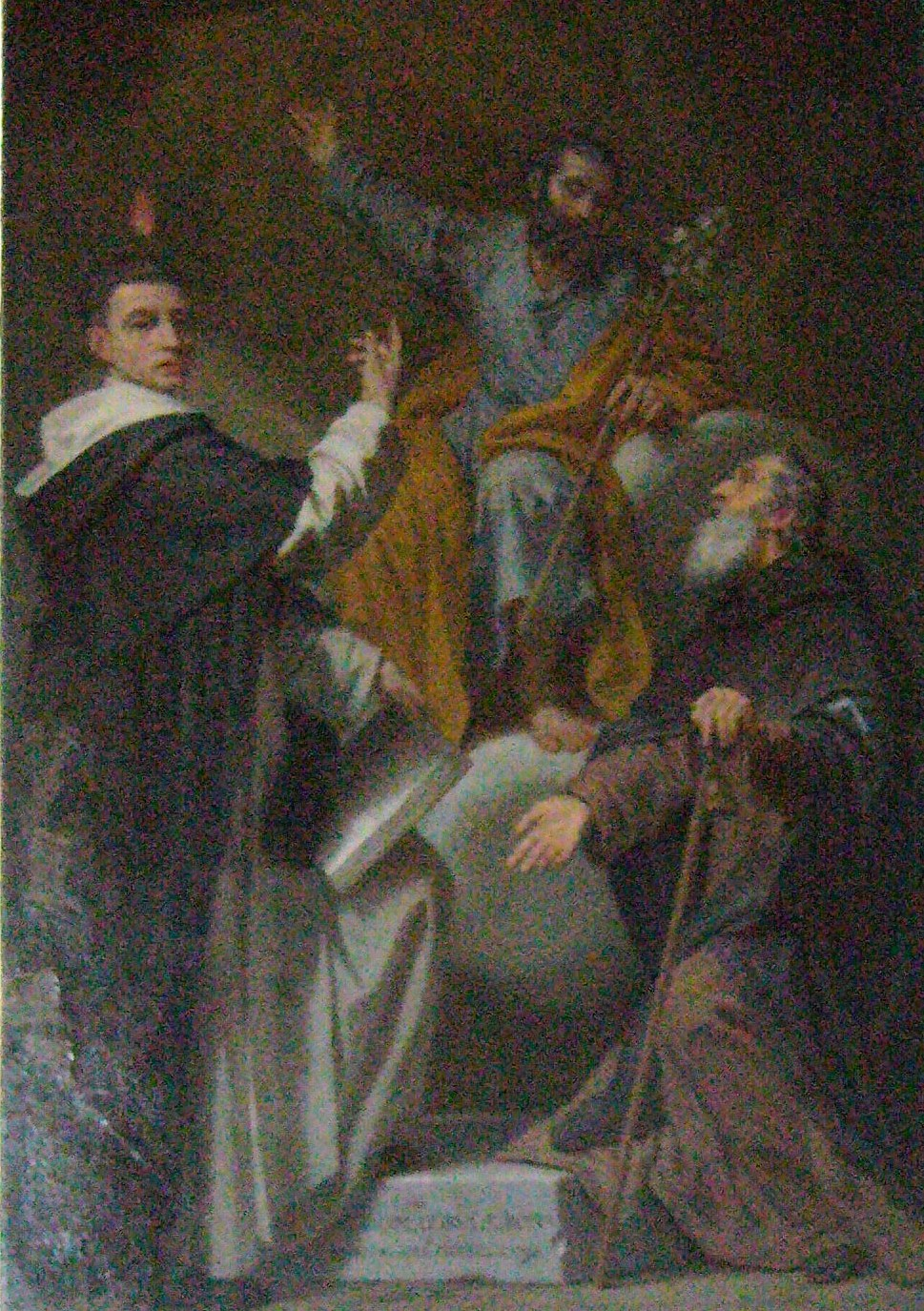 Domenico Corvi: San Giusppe e i Santi Vicenzo Ferrer e Antonio Abate - museo civico Palazzo Santi, Cascia